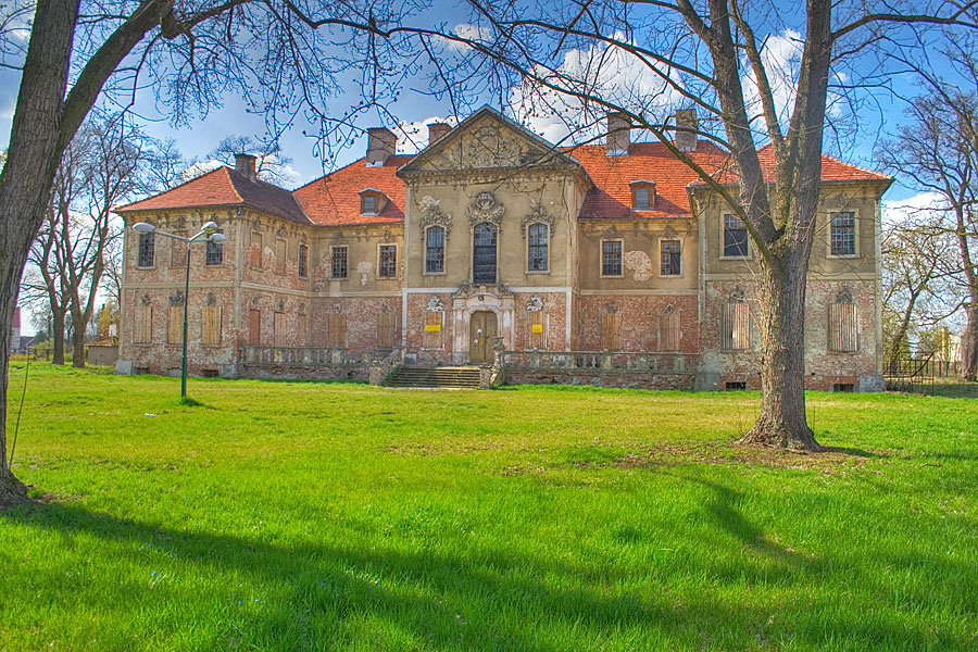 Pałac w Bojadłach. Zabytek nr rej. 205 z 20.03.1961.